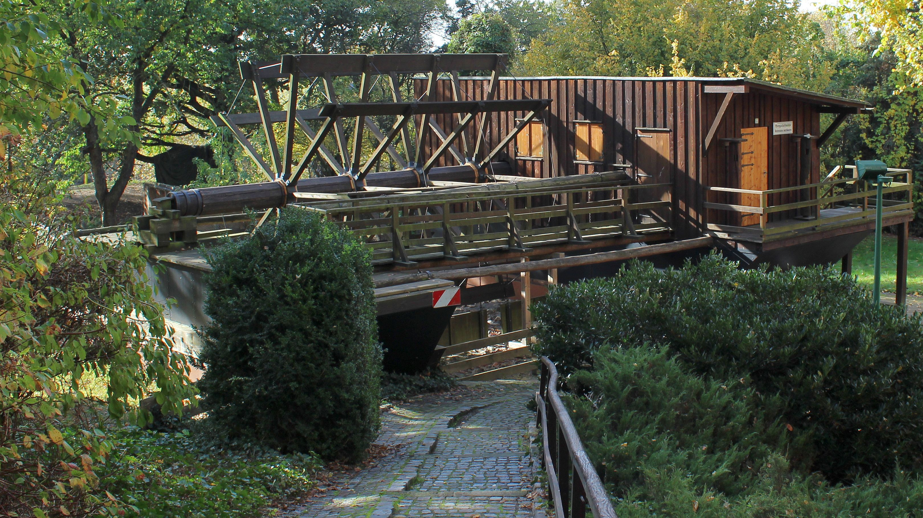 Schiffmühle im Burggarten Bad Düben